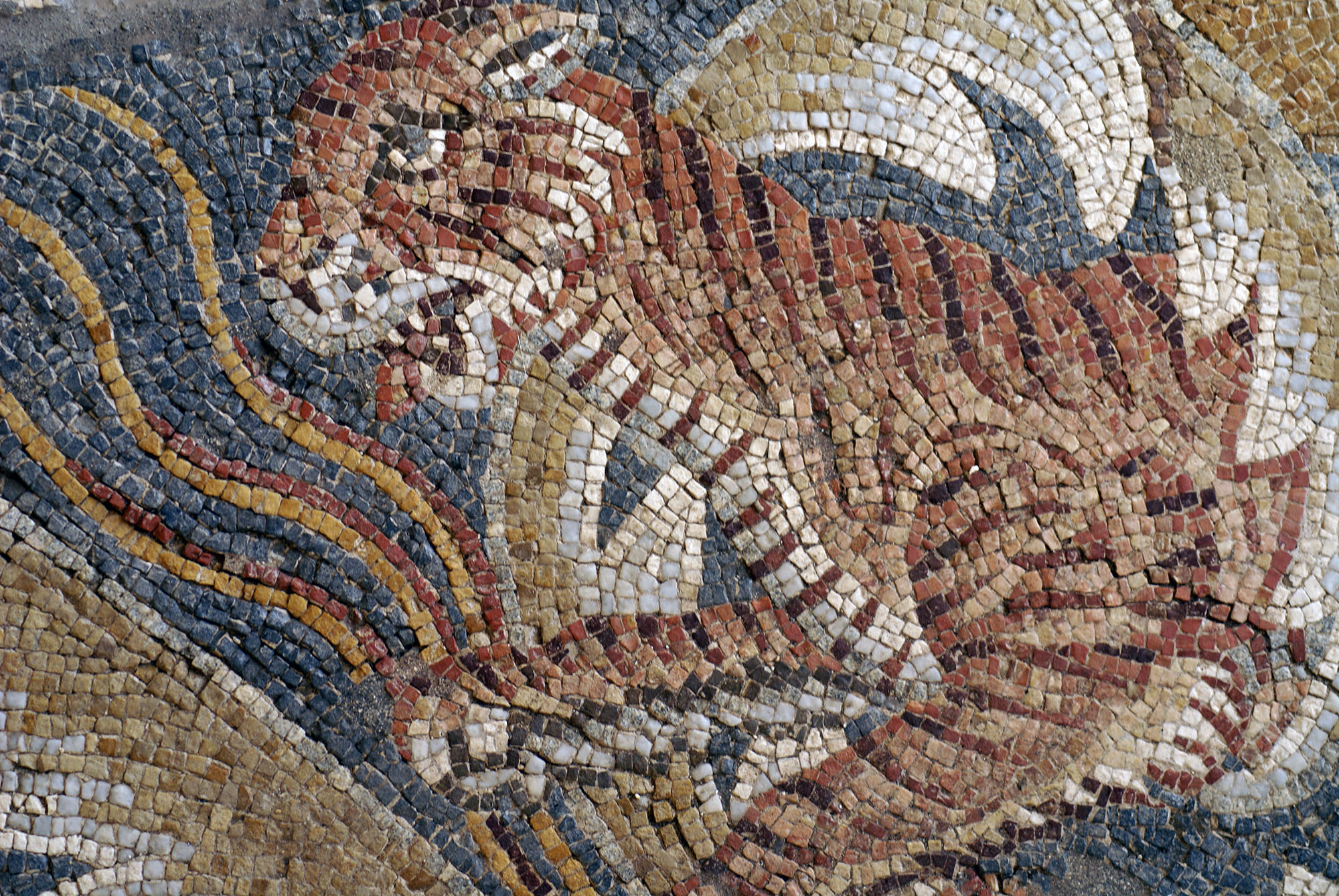 A detail of a tiger hunting scene in the Villa. Although smaller the detail and the mastery of the mosaicist of this Villa equals the Villa at Piazza Armerina. Dettaglio del "Mosaico della caccia" della villa romana del Tellaro a Noto (Siracusa).